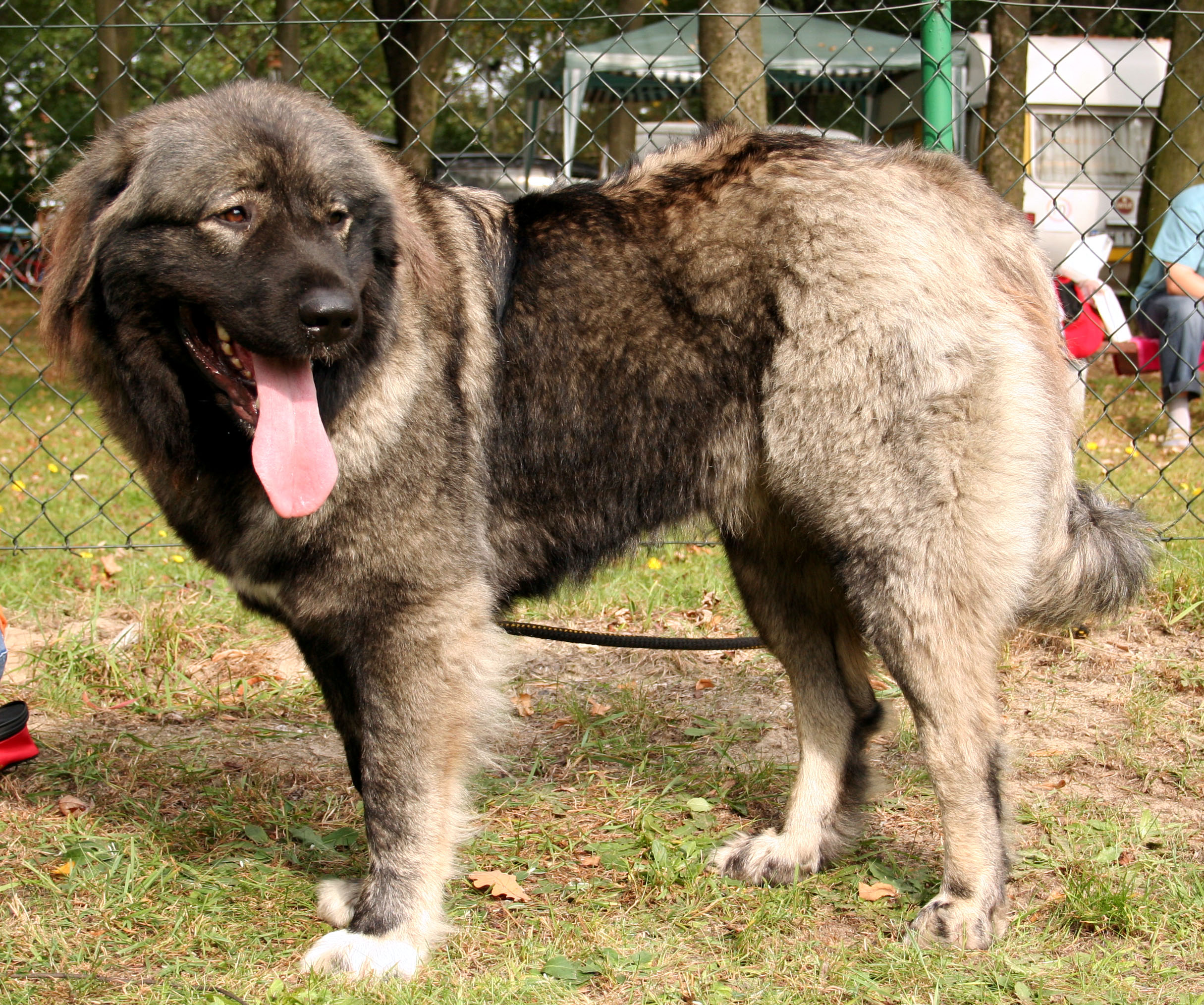 Owczarek kaukaski na krajowej wystawie w Rybniku - Kamieniu